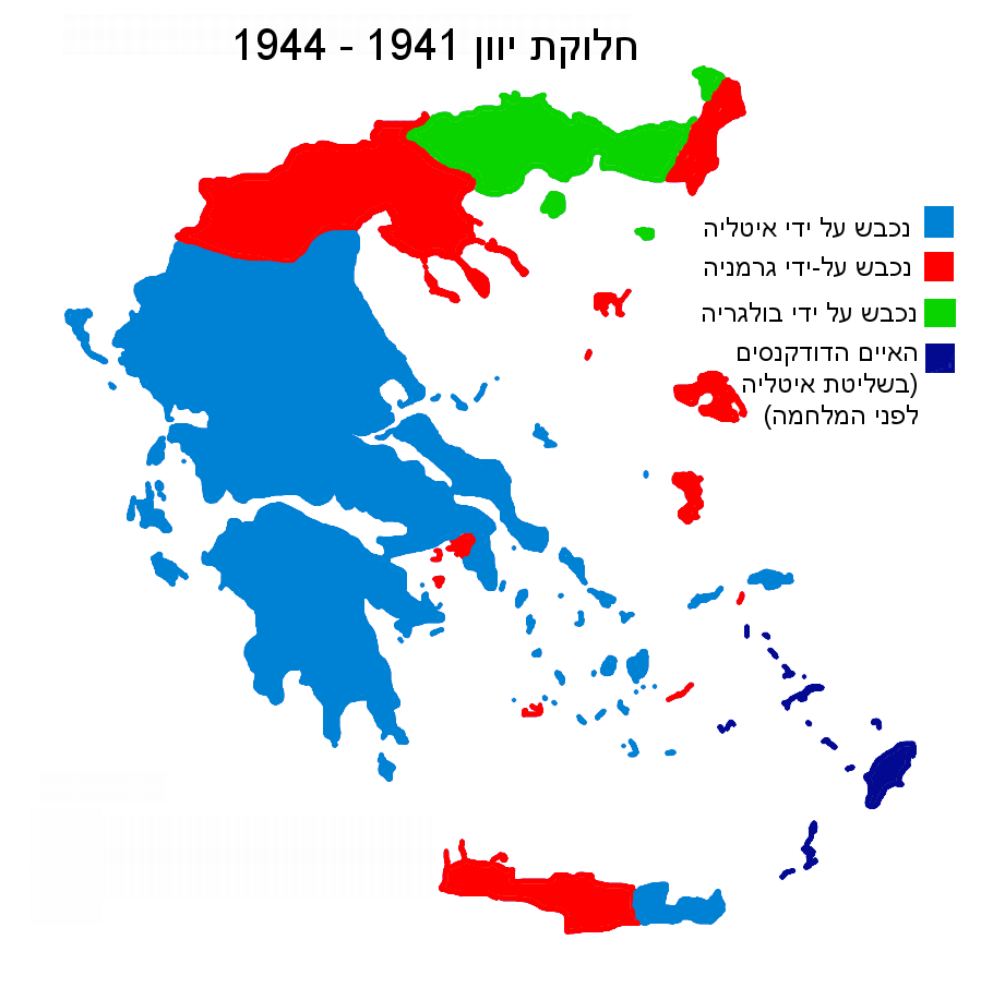 כיבוש יוון במלחמת העולם השנייה